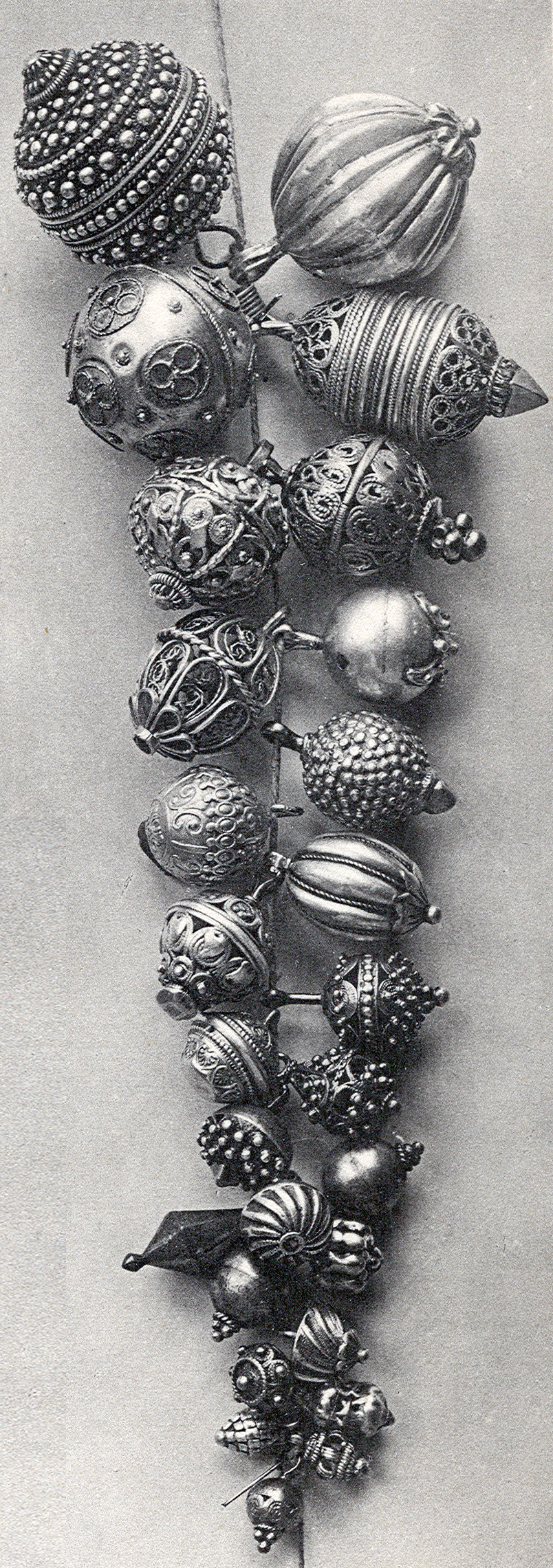 Fotografija iz likovne mape "Dalmacija i njena narodna umjetnost", objavljene u Beču 1911. godine.